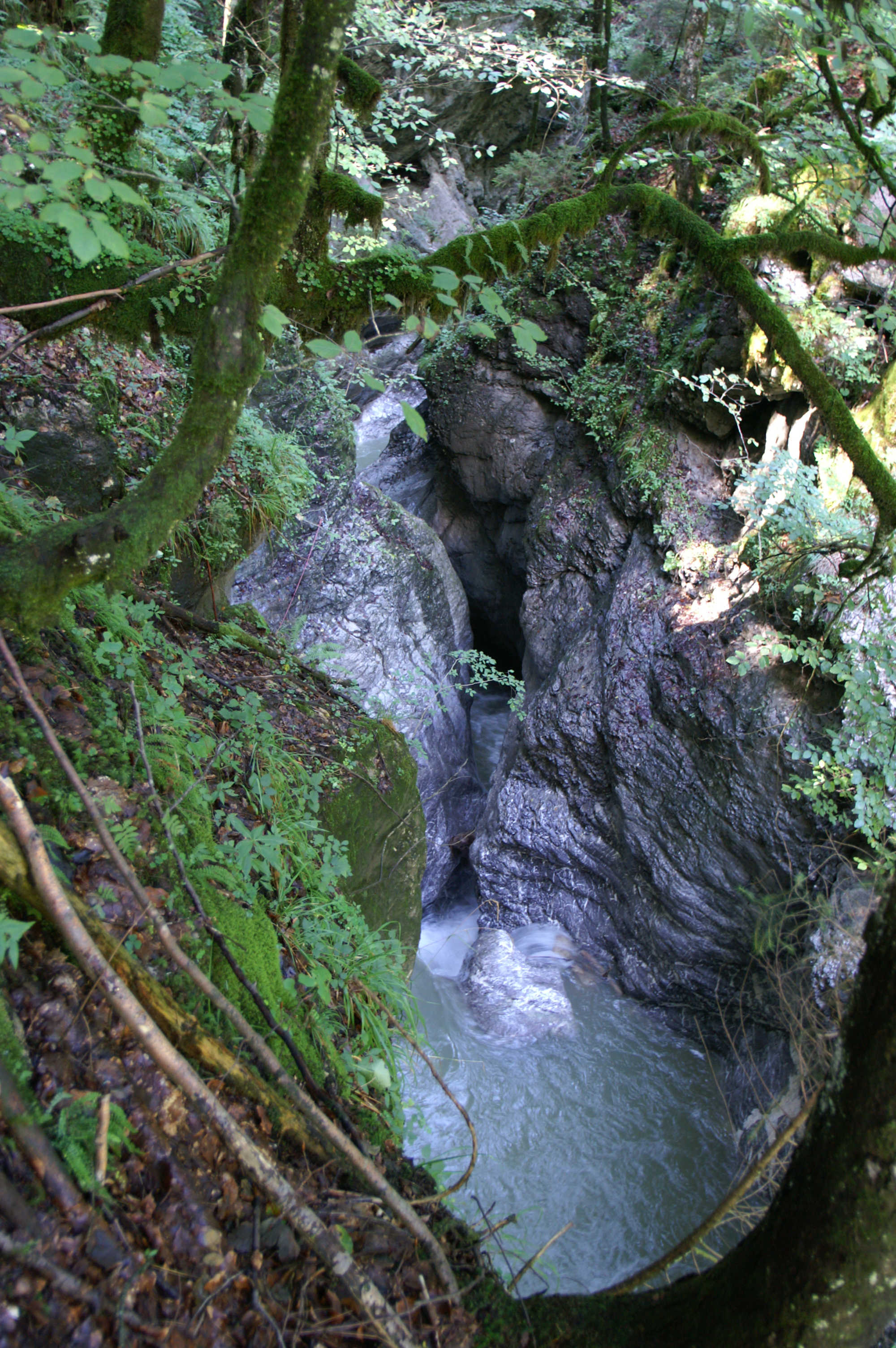 Die Kobelach verläuft parallel zur Rappenlochschlucht in Dornbirn und wird zum Canyoning begangen. Blick von der gedeckten Amannbrücke.